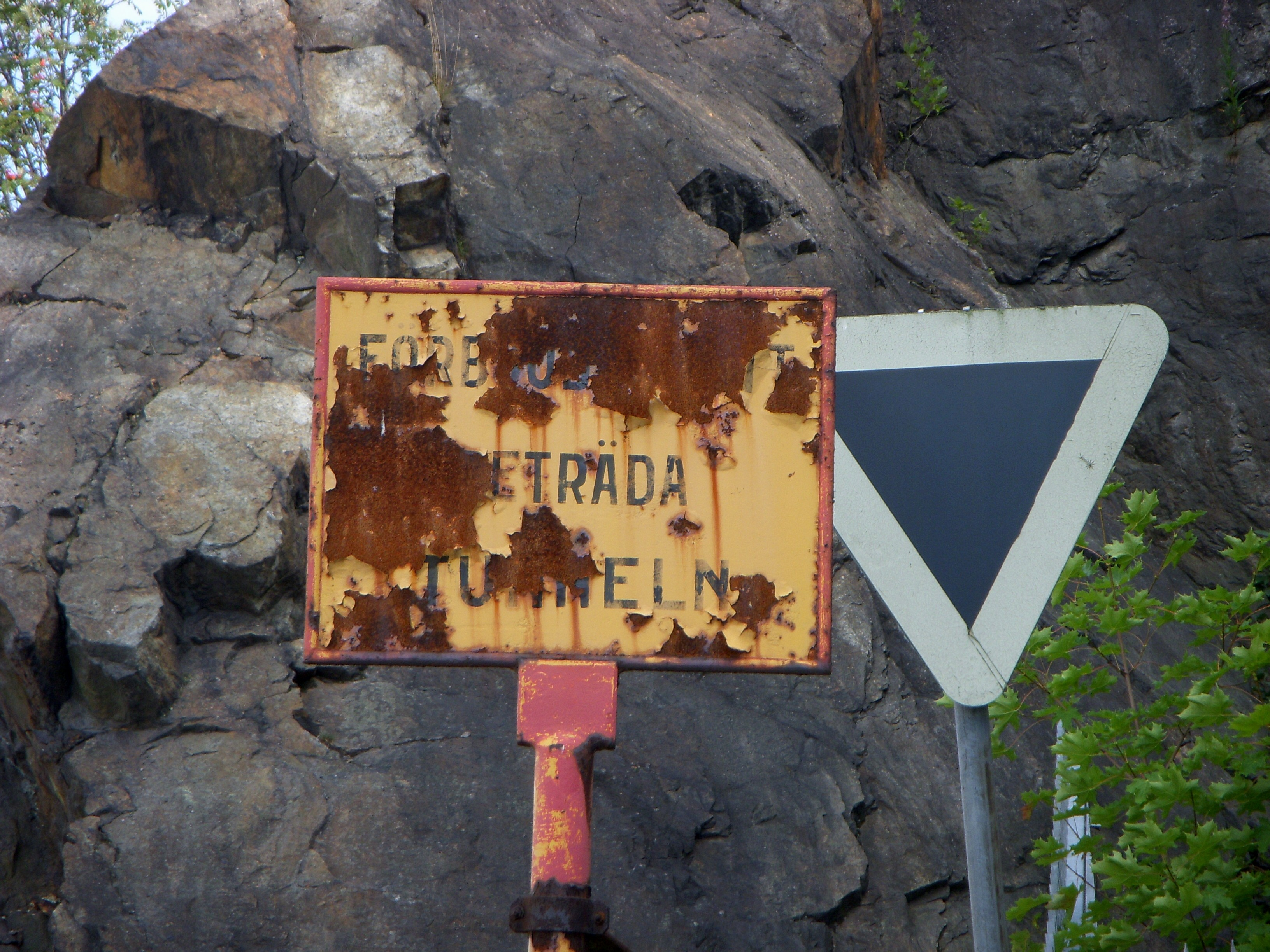 Södersjukhusets spår vid Fåfängan, Södermalm, Stockholm, skylt